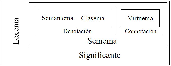 Lexema e compoñentes